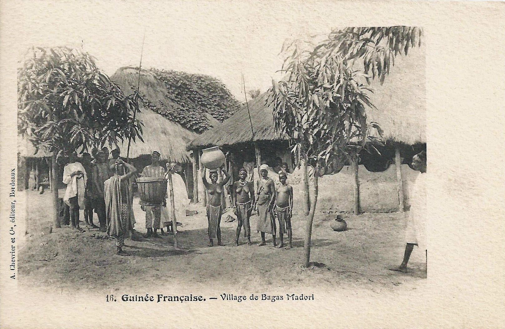 Village de Bagas Madori. A. Chevrier et Cie, Bordeaux Guinée française.